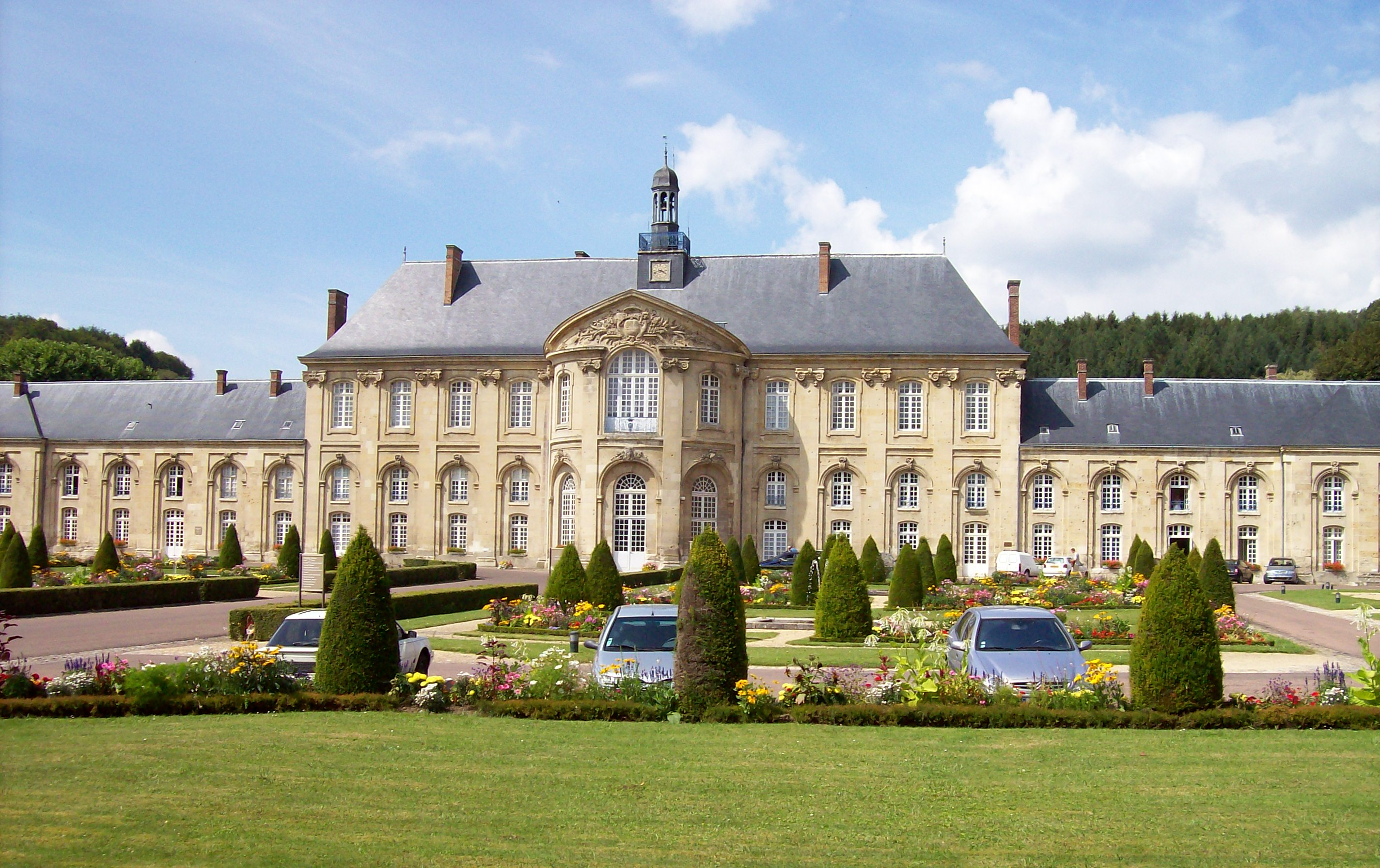 Palais abbatial de l'ancienne abbaye norbertine de Prémontré (maintenant un hopital psychiatrique)